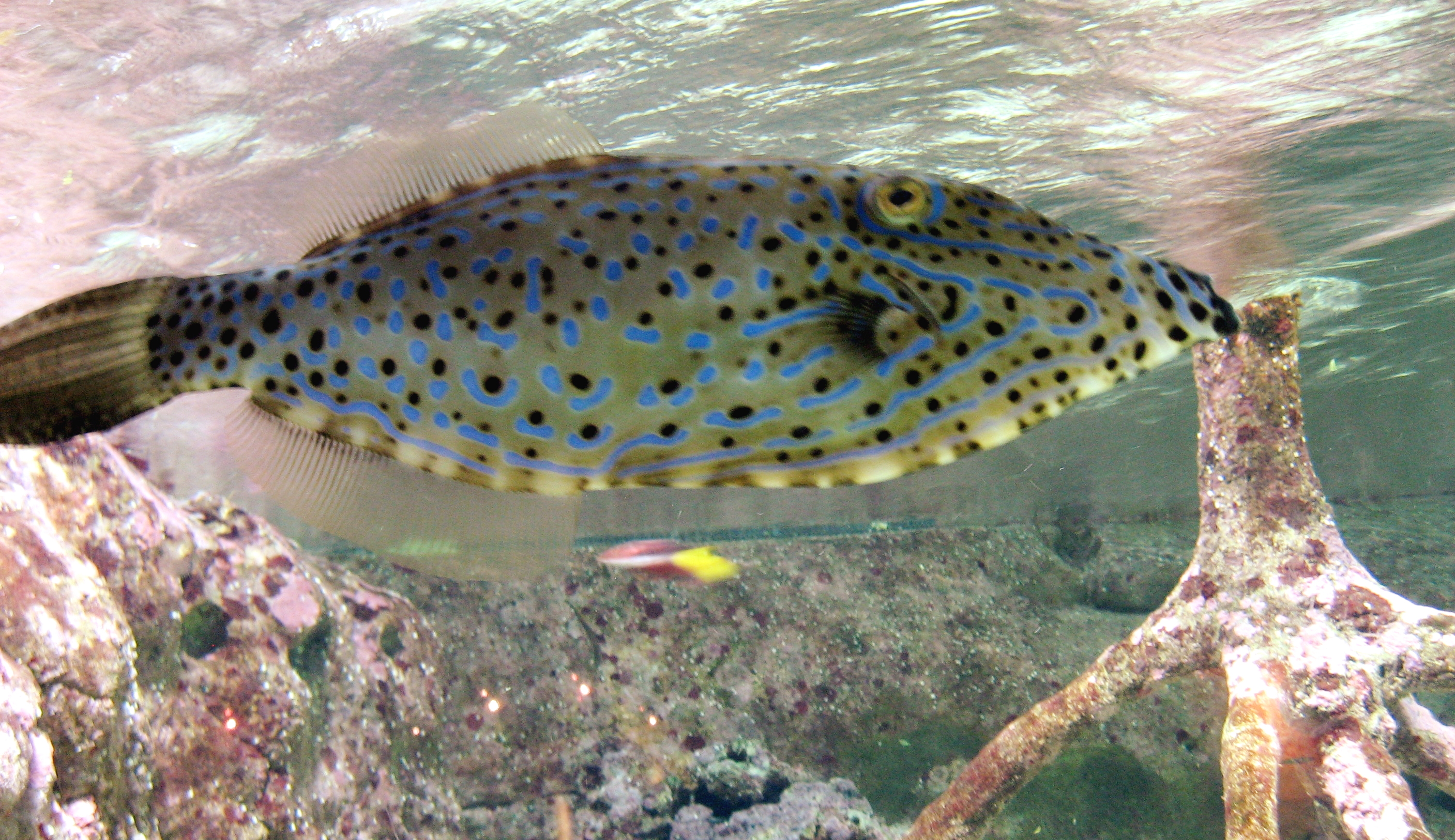 Aluterus scriptus in Aquarium Cinéaqua Map: 48° 51' 44" N 2° 17' 27" E